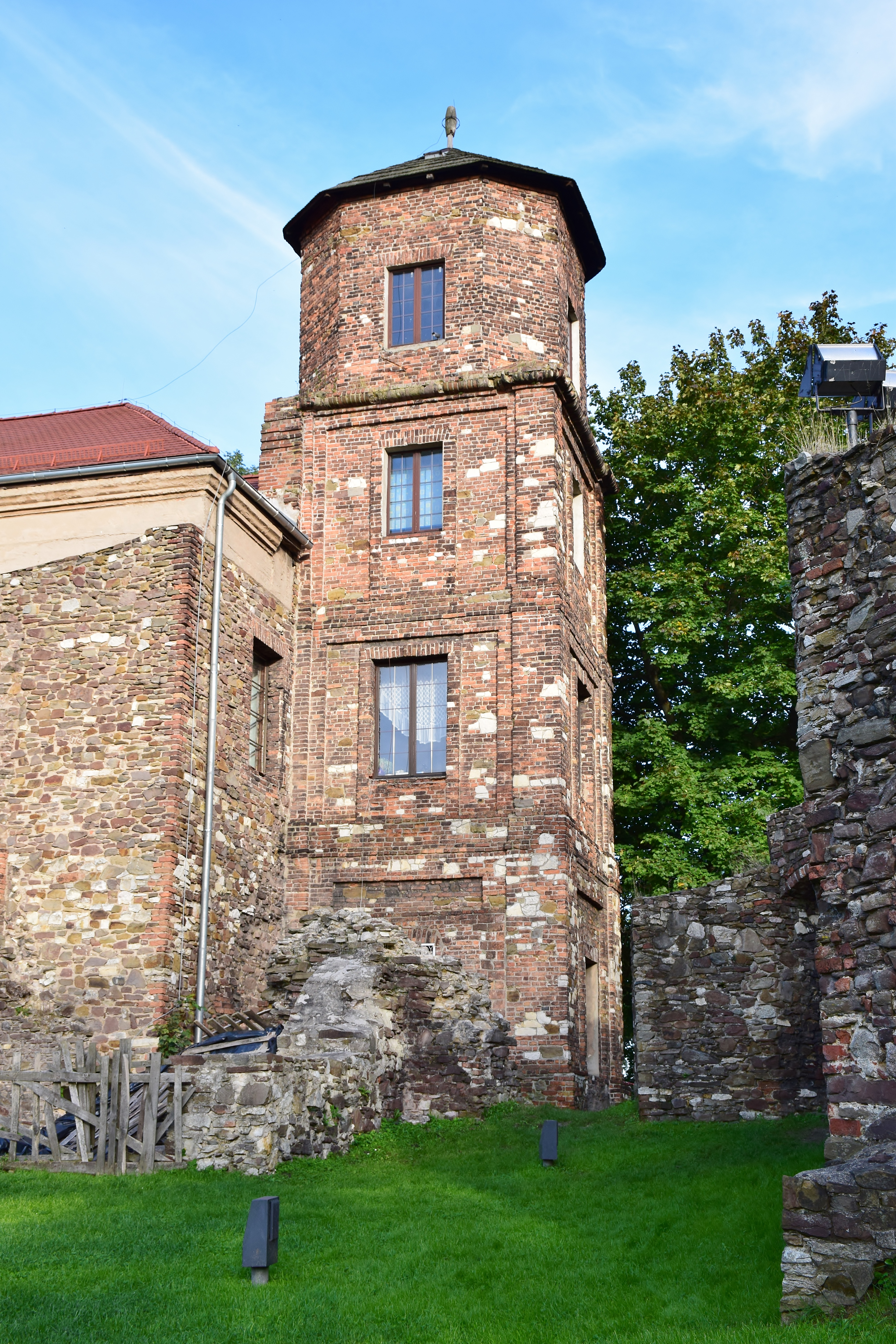 Toszek, zamek, XV w.